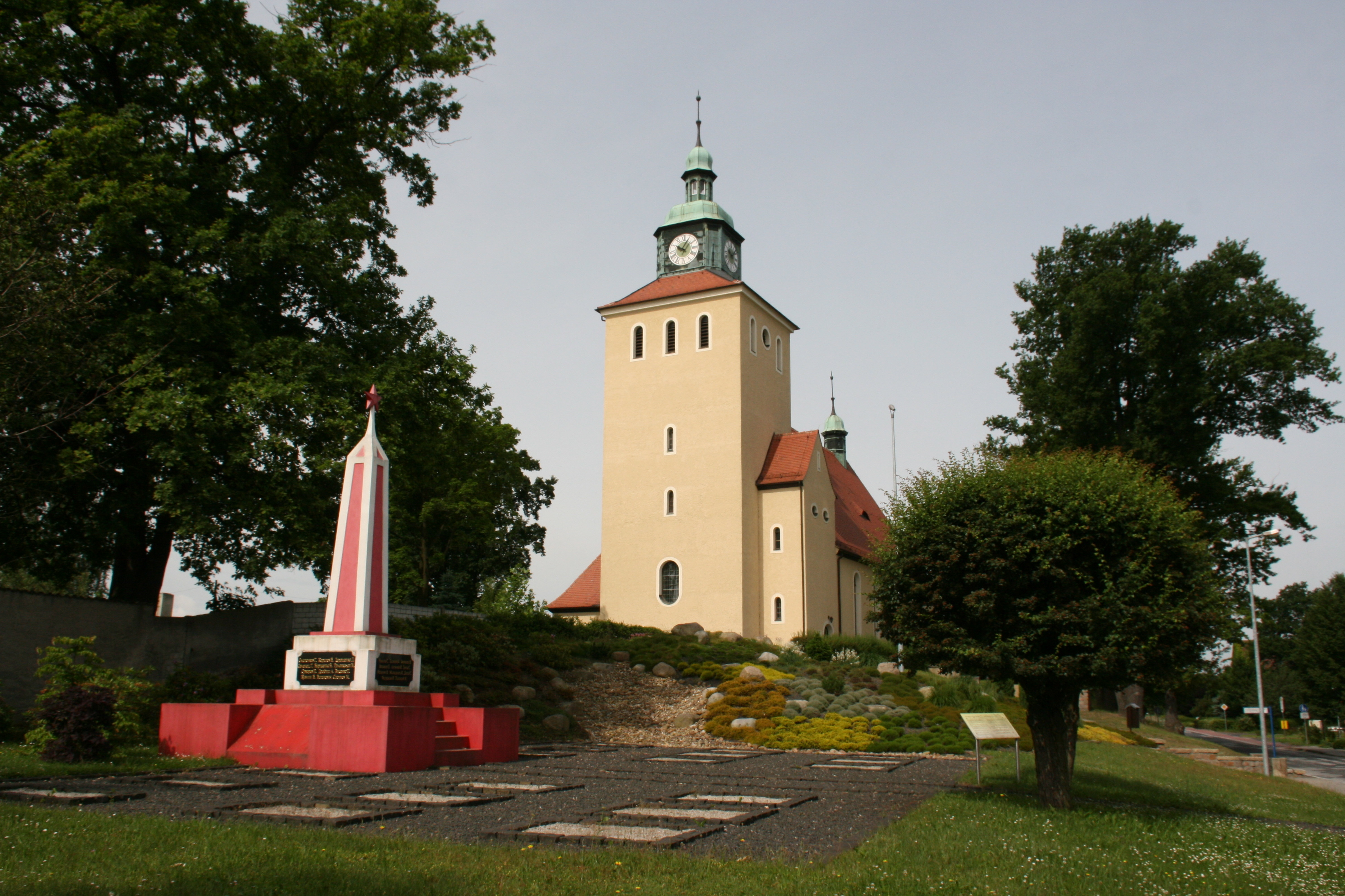 Soldatenfriedhof der Sowjetarmee mit Ehrenmal und evangelische Kirche an der Kirchstraße in Rietschen